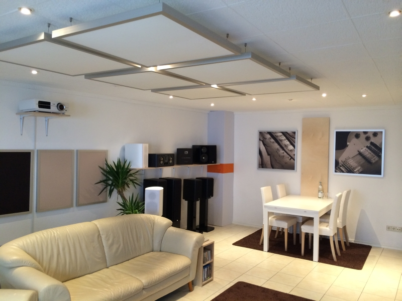 Raumakustisch optimiertes Zimmer zur Vorführung von Hifi-Produkten.